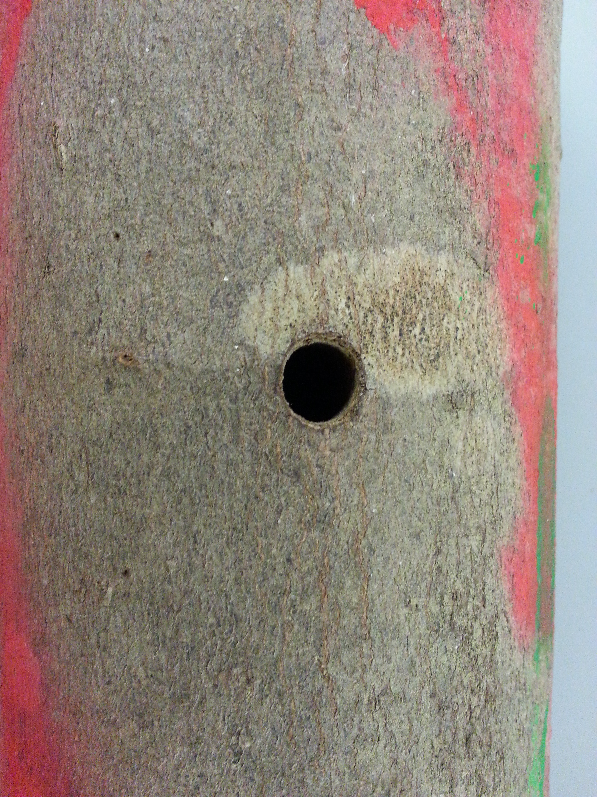 Ausbohrloch des Asiatischen Laubholzbockkäfers (Anoplophora glabripennis) an einem Schaustück der Bayerischen Landesanstalt für Landwirtschaft (LfL)